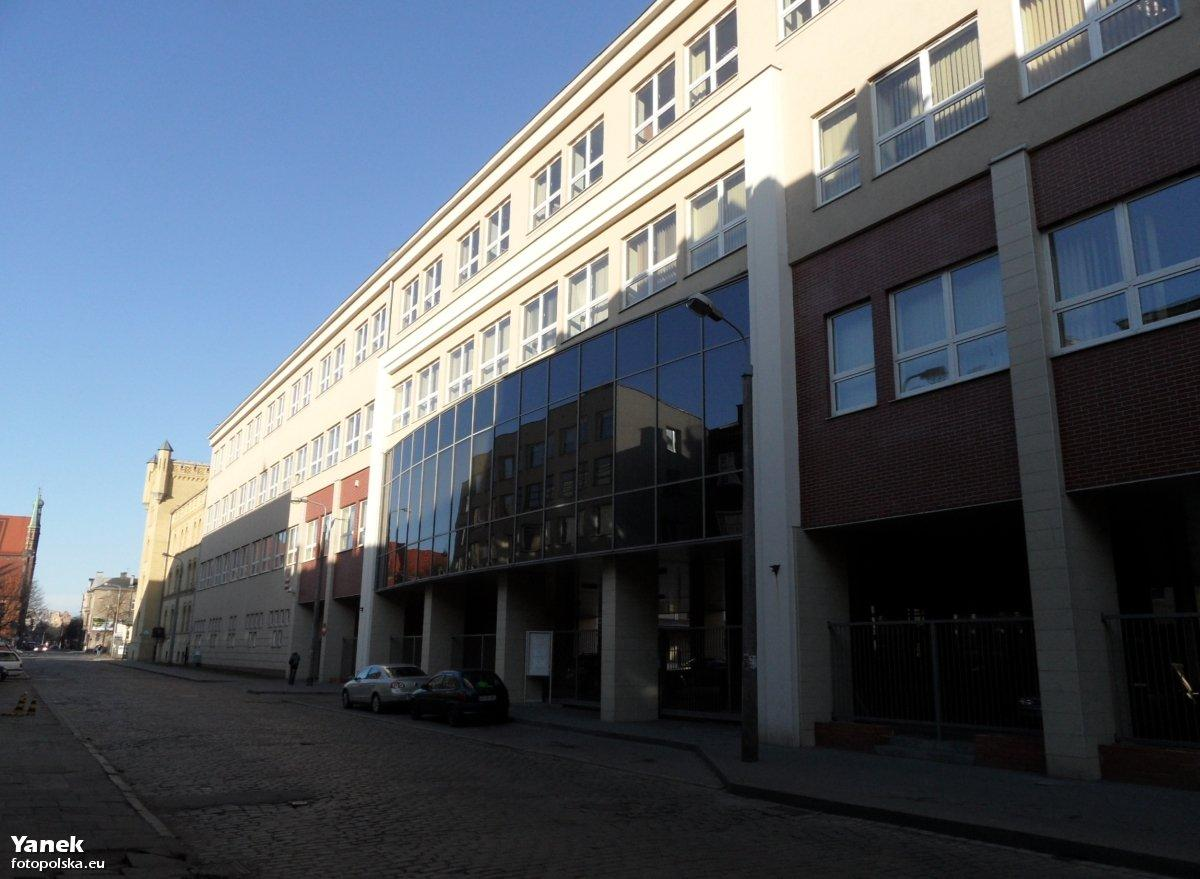 Dawne skrzydło koszar Wijbego, po kilku przebudowach i adaptacjach, obecnie mieści się w nim Pierwszy US w Gdańsku